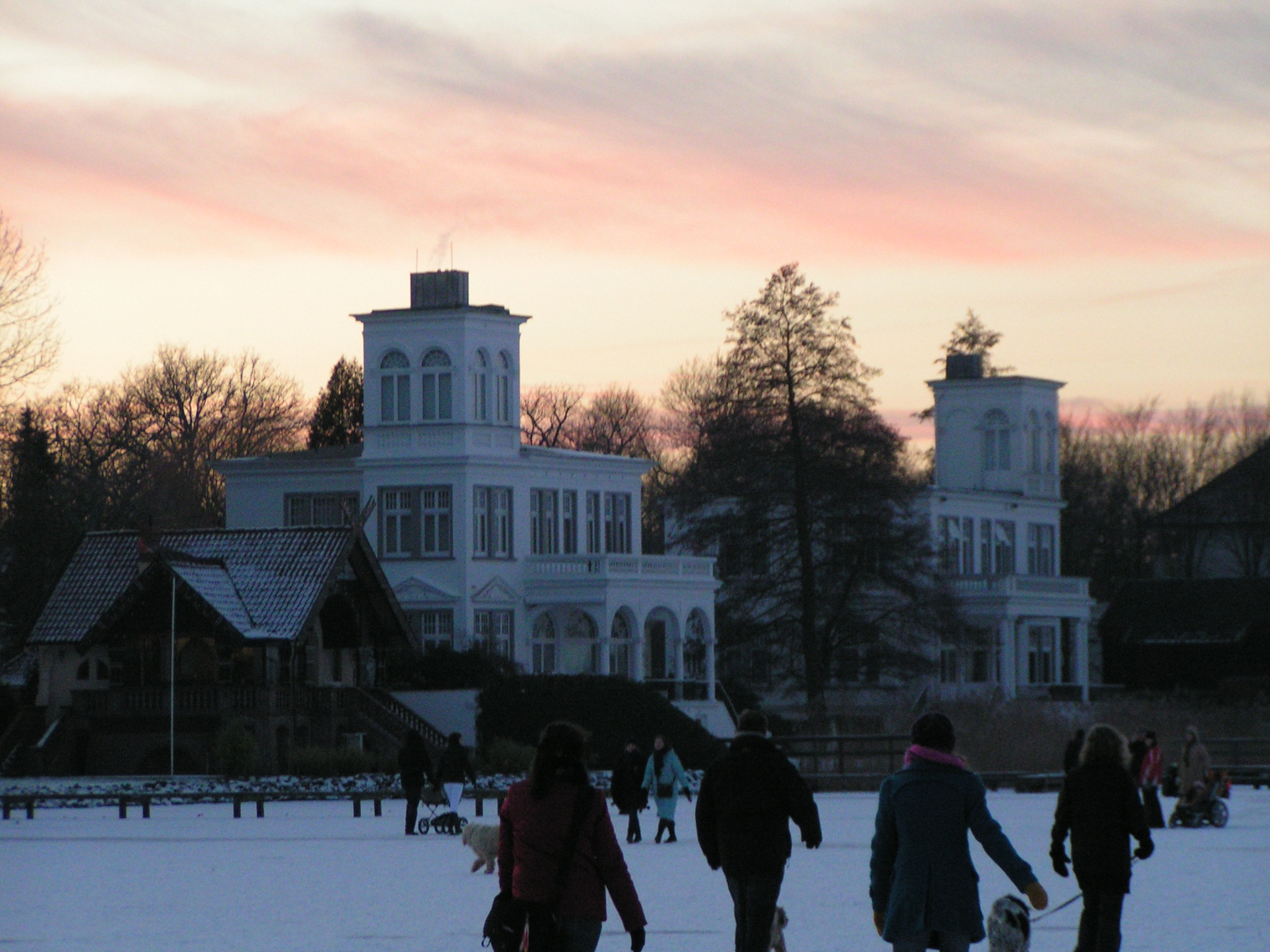 Zwischenahner Meer im Winter